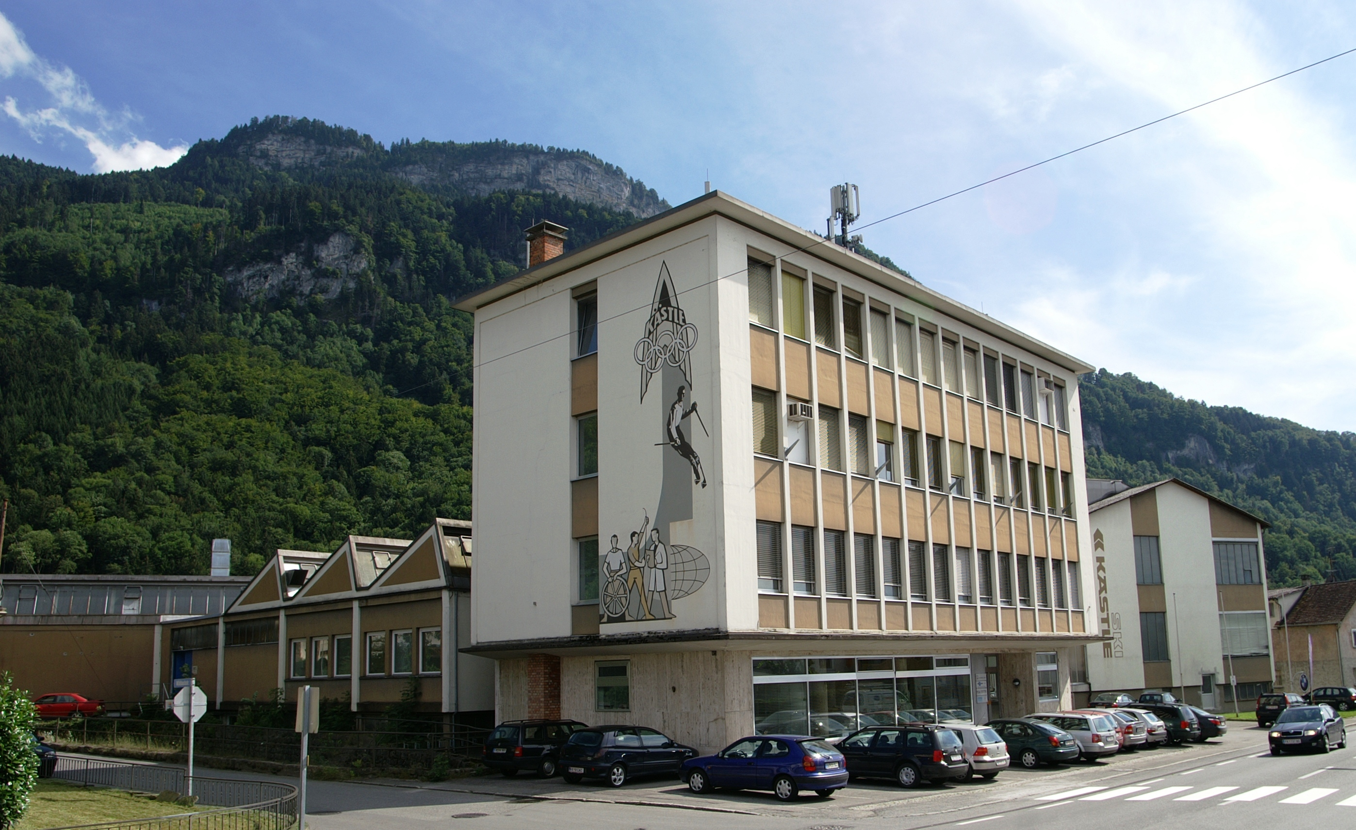 das Werksareal des Skiherstellers Kästle in Hohenems, Vorarlberg